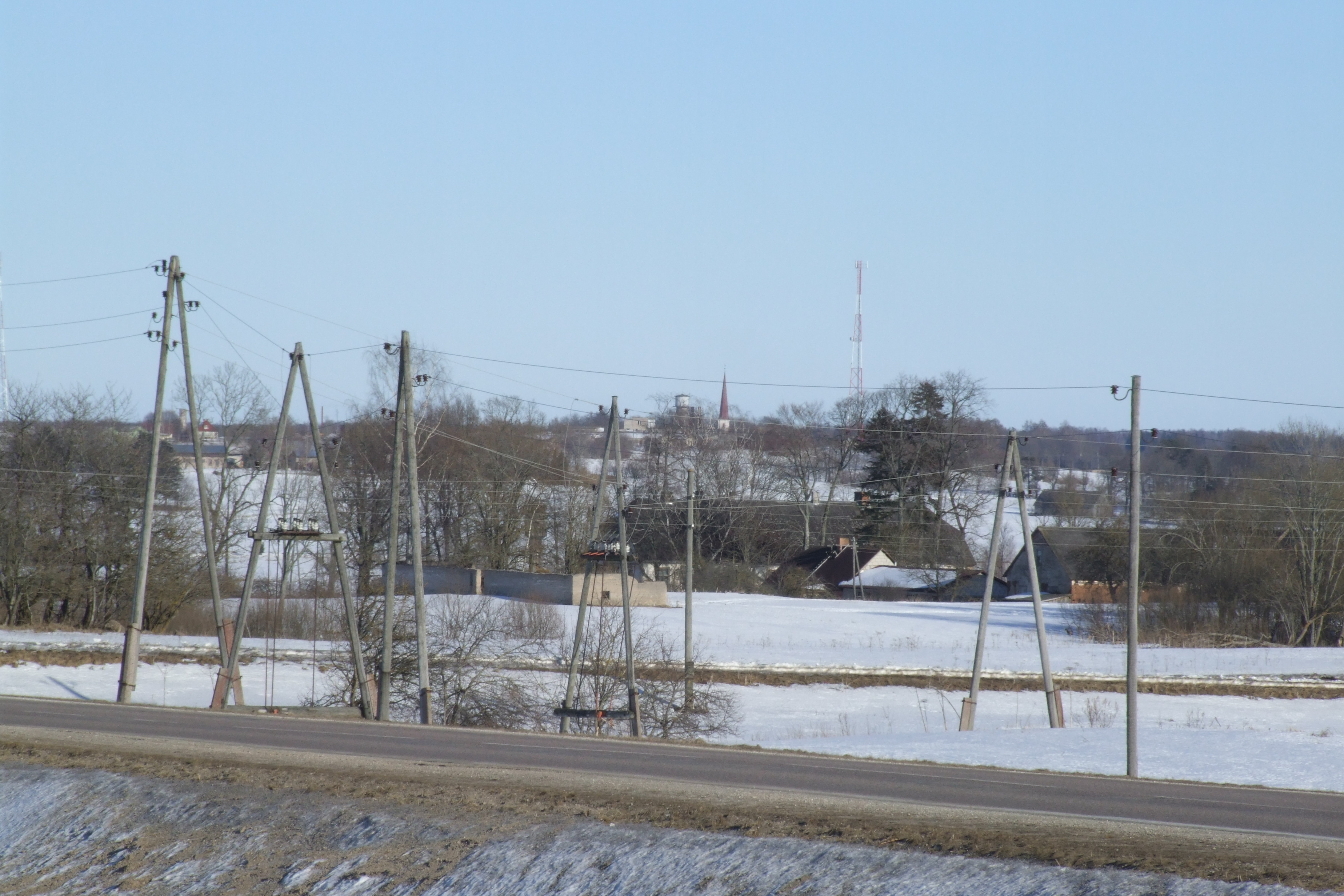 Skats uz Laucieni, 16.03.2013.